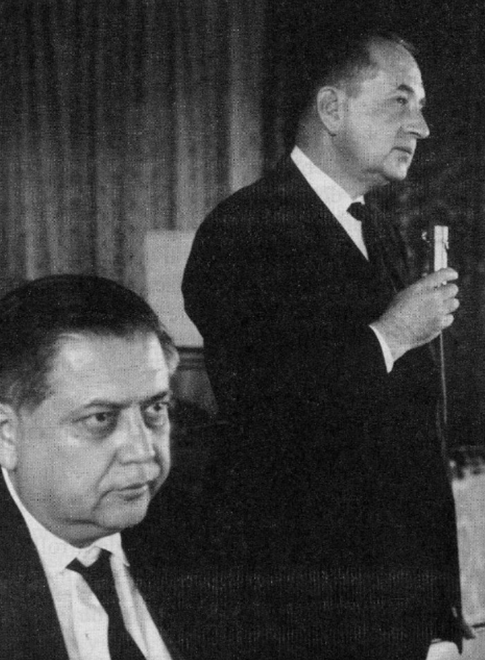 Federico de Aguinaga y el Padre Aguila Zepeda